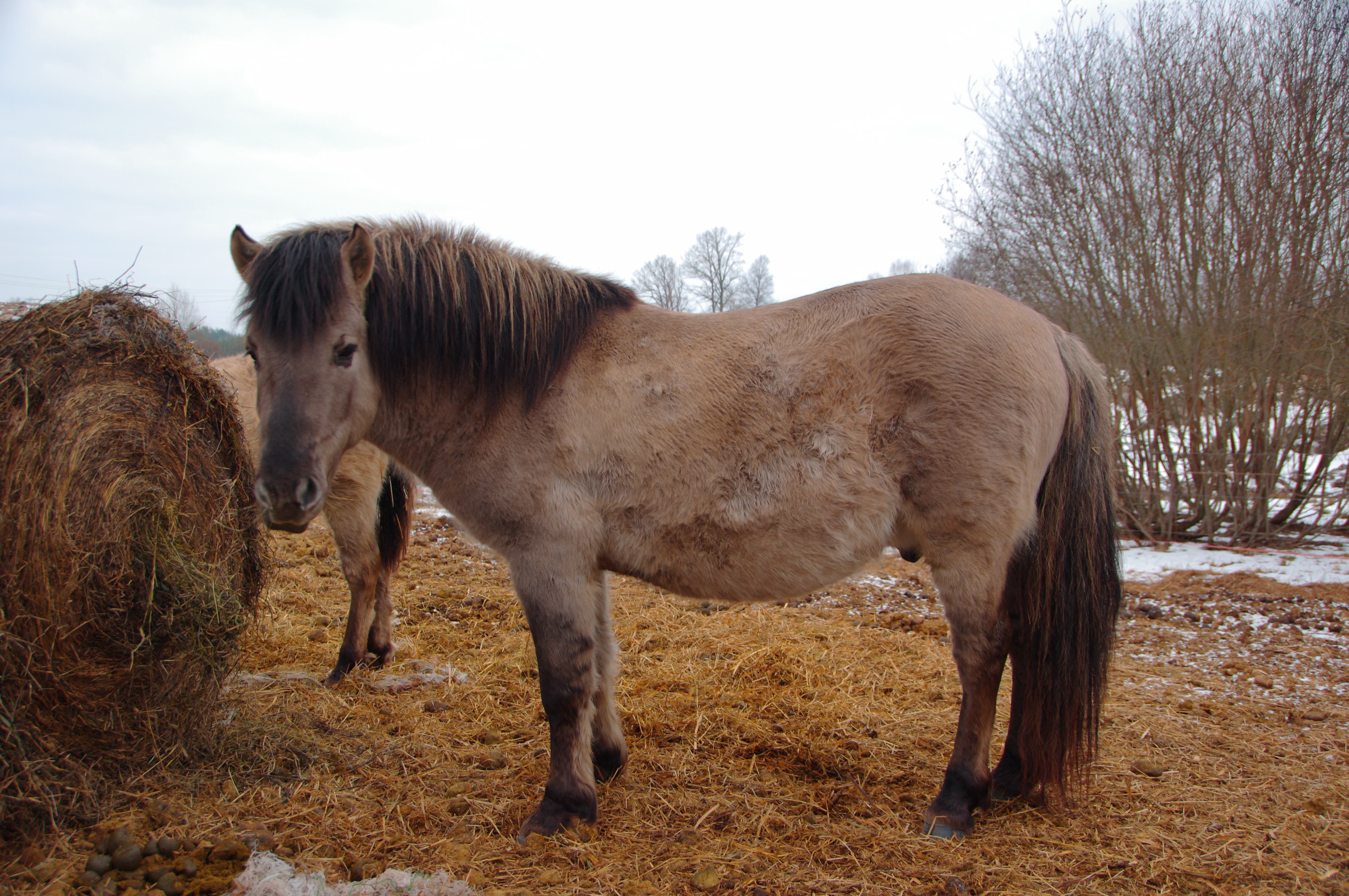 Konik Polski